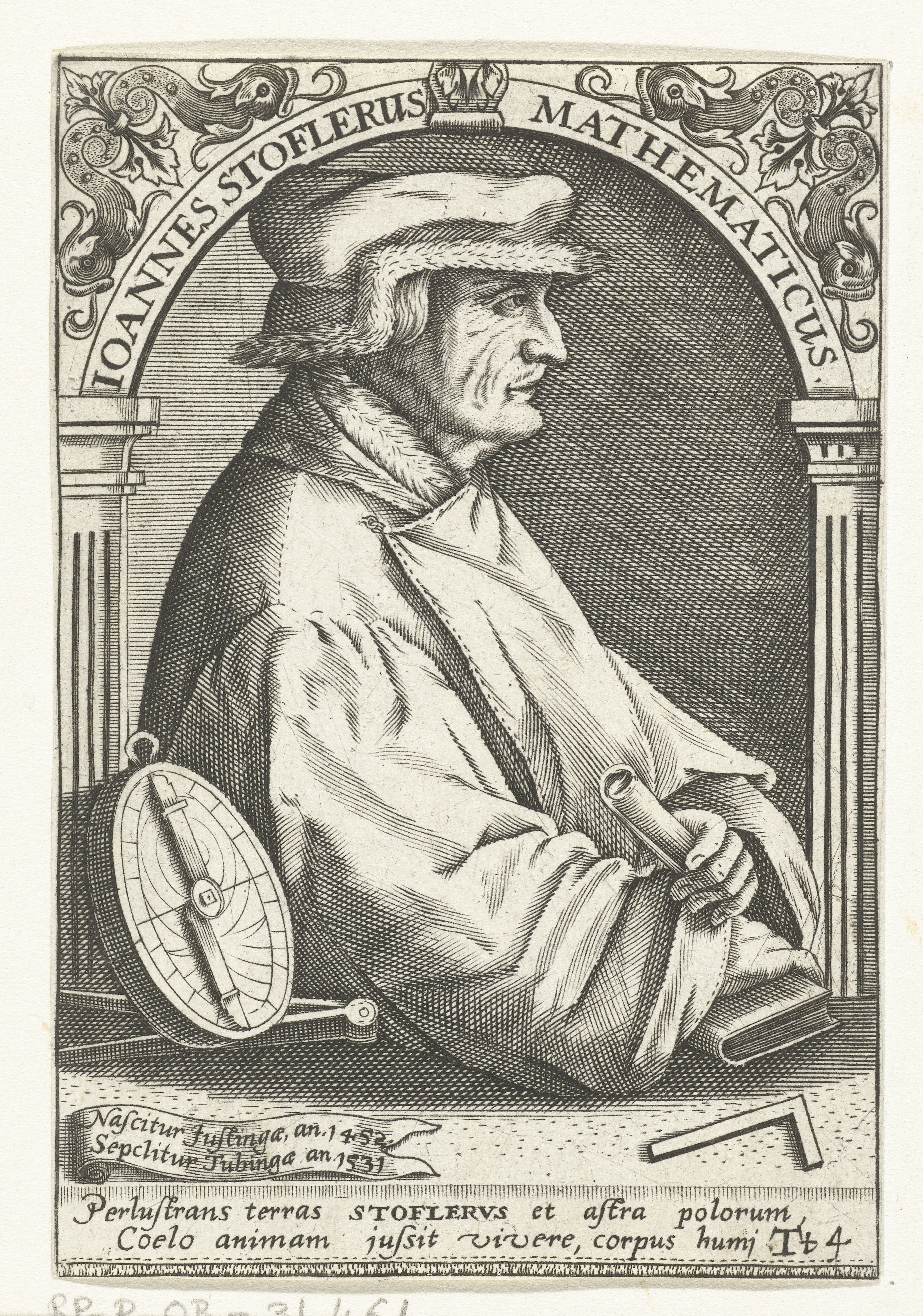 IdentificatieTitel(s): Portret van Johannes StöfflerIoannes Stoflerus (titel op object)Objecttype: prent boekillustratie Objectnummer: RP-P-OB-31.461Catalogusreferentie: Singer 87807Omschrijving: Portret van de wiskundige Johannes Stöffler, in een nis aan een tafel. Onder het portret een lofdicht.VervaardigingVervaardiger: prentmaker: Theodor de Bryprentmaker: Johann Theodor de Brynaar ontwerp van: Jean Jacques Boissard (mogelijk)Plaats vervaardiging: Frankfurt am MainDatering: ca. 1597 - ca. 1599 en/of 1669Fysieke kenmerken: gravureMateriaal: papier Techniek: graveren (drukprocedé)Afmetingen: plaatrand: h 140 mm × b 100 mmToelichtingGemaakt voor: J.J. Boissard, Icones virorum illustrium doctrina &c eruditione praestanti um contines. Frankfurt am Main: de Bry, 1597-1599. Opnieuw gebruikt in: J.J.Boissard, Bibliotheca chalcographica, hoc est Virtute et eruditione clarorum Virorum Imagines. Heidelberg: Clemens Ammon, 1669. Dl. 1-5 (te herkennen aan de toegevoegde signatuur in de rechter onderhoek: 2T4).OnderwerpWie: Johannes StöfflerVerwerving en rechtenVerwerving: onbekendCopyright: Publiek domein